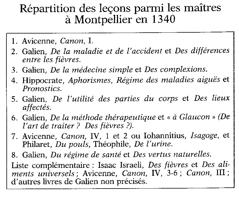 Répartition des leçons parmi les maîtres à Montpellier en 1340